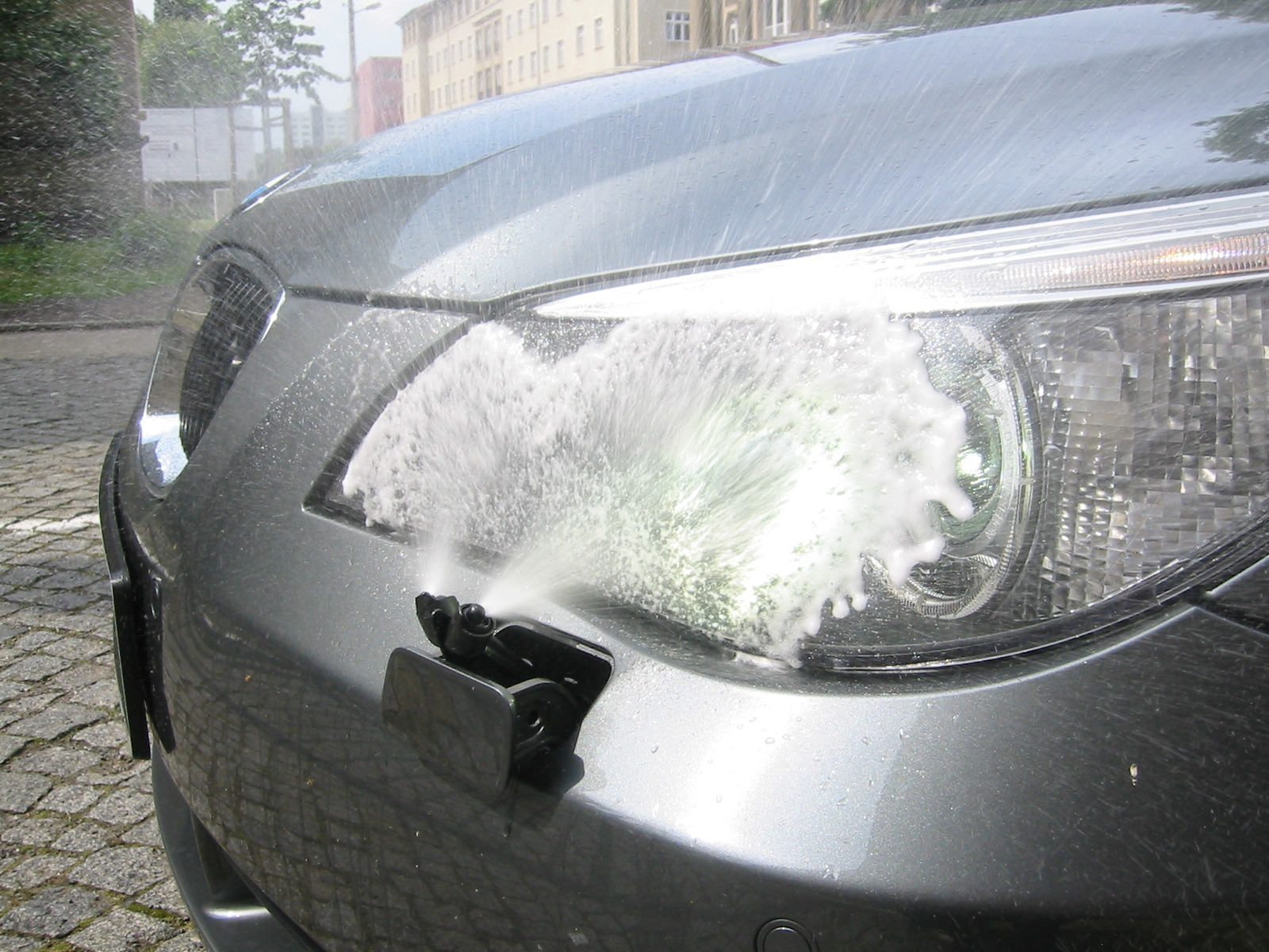 Scheinwerferwaschanlage beim Sprühen